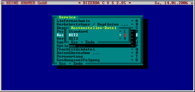 Beispiel für eine zeichenbasiserte Benutzerschnittstelle unter MS-DOS